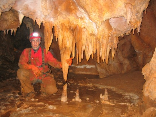 In der "Schatzkammer", Gasselhöhle, Ebensee, Salzkammergut, Österreich